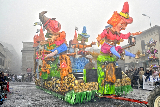 Carnevale Cremasco 2008